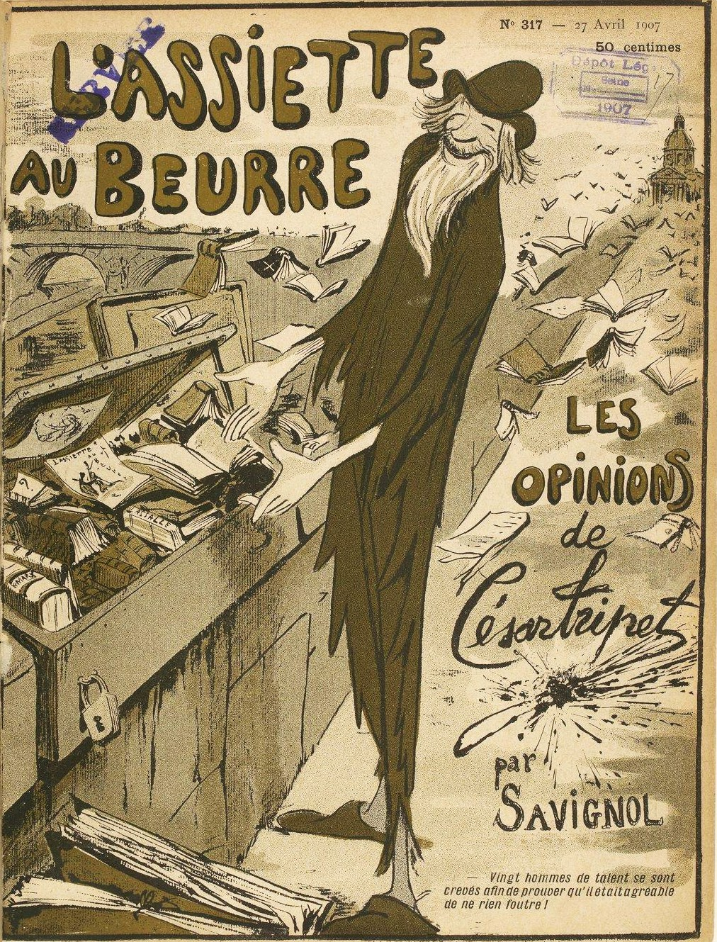 L'Assiette au beurre n° 317 du 27 avril 1907 : « Les opinions de César Tripet » par Marius Savignol.